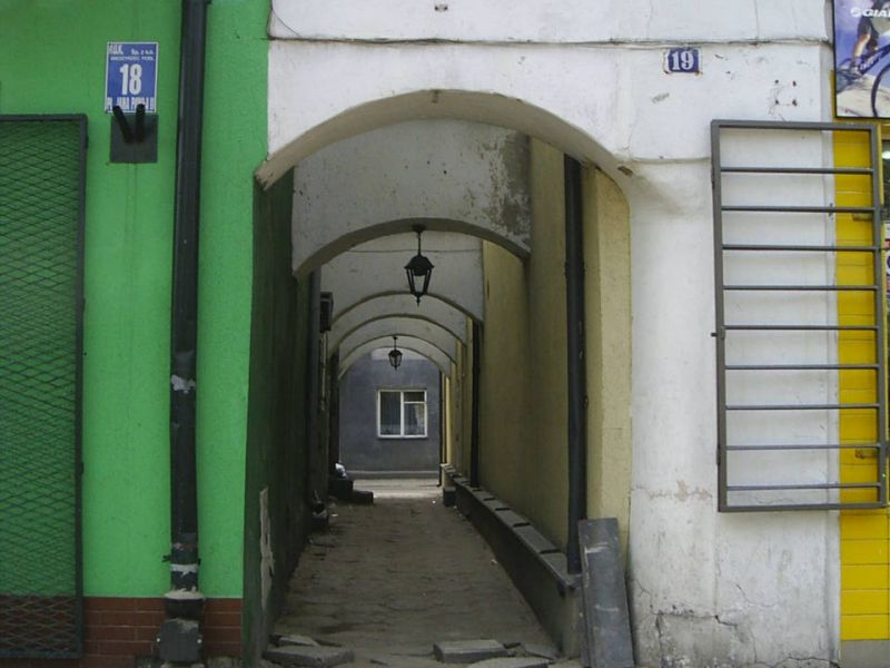 Międzyrzec Podlaski